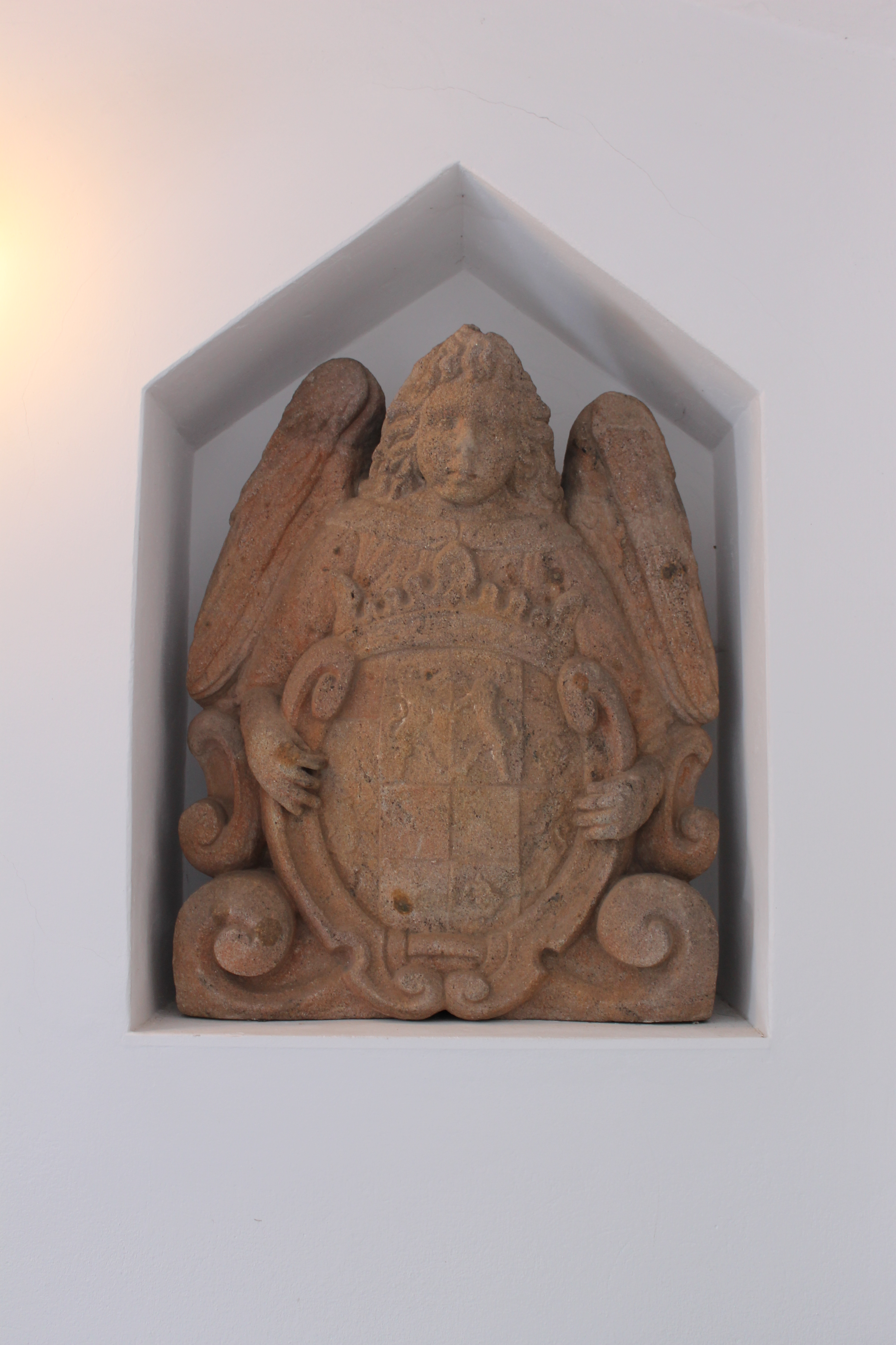 Wappentragender Engel - Wappen der Herren von Wildenfels, den Grafen von Solms-Wildenfels - in der Ev.-Luth. Kirche zu den Drei Marien *** Härtensdorf, der ehem. Hofkirche der Herrschaft Wildenfels